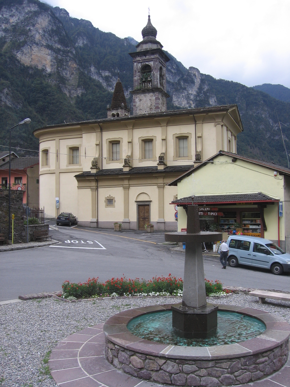 Bordogna, frazione di Roncobello